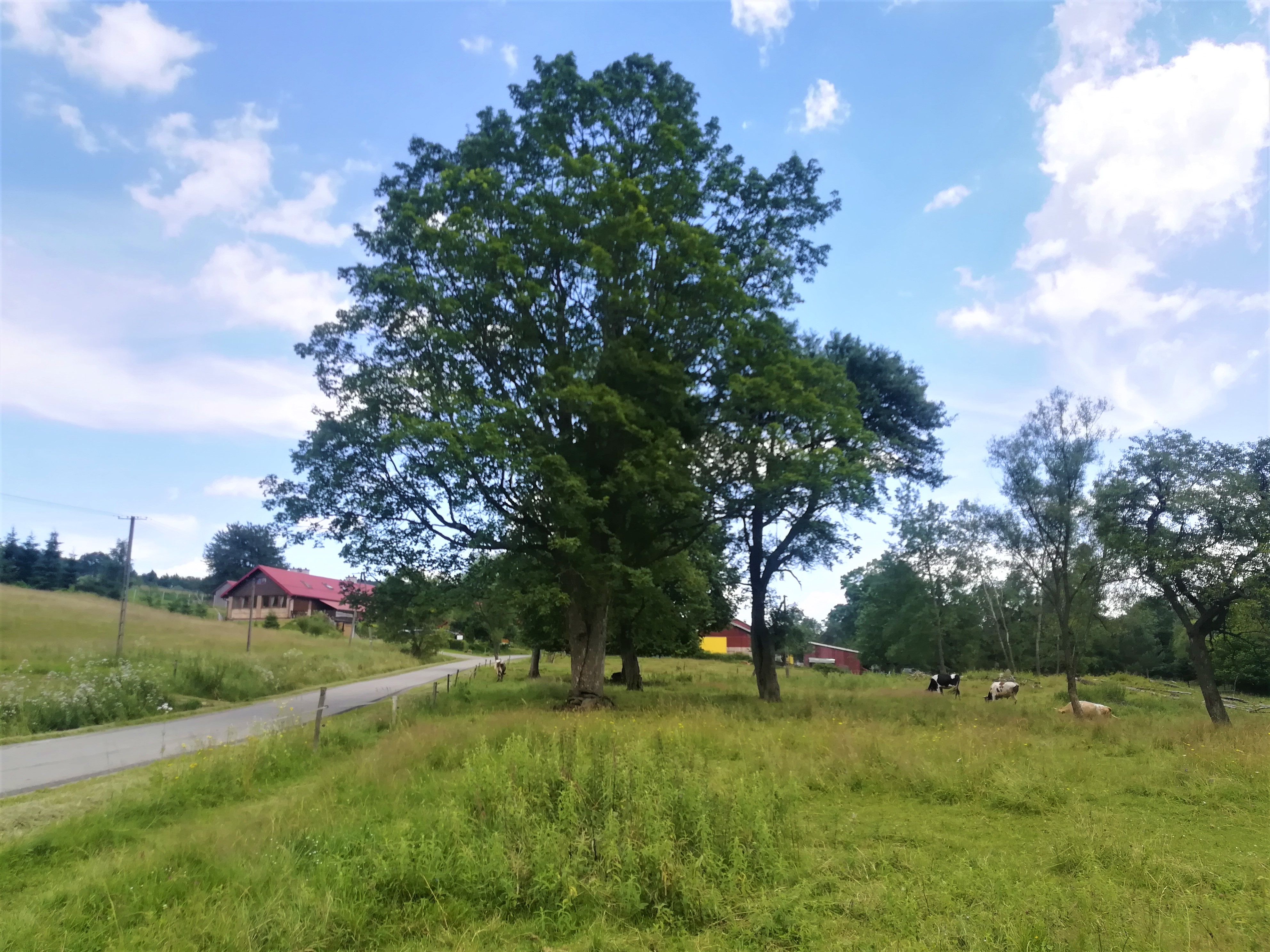 Krajobraz ze wsi Blechnarka w Beskidzie Niskim.